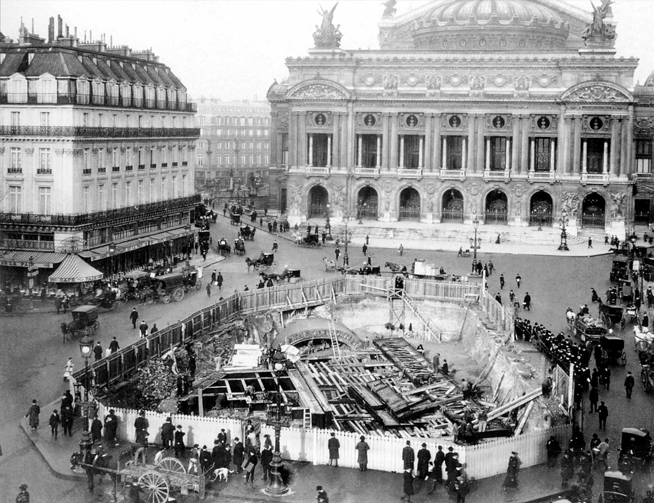 Ouvrage de superposition des lignes 3, 7 et 8 du métro de Paris, place de l'Opéra, France.